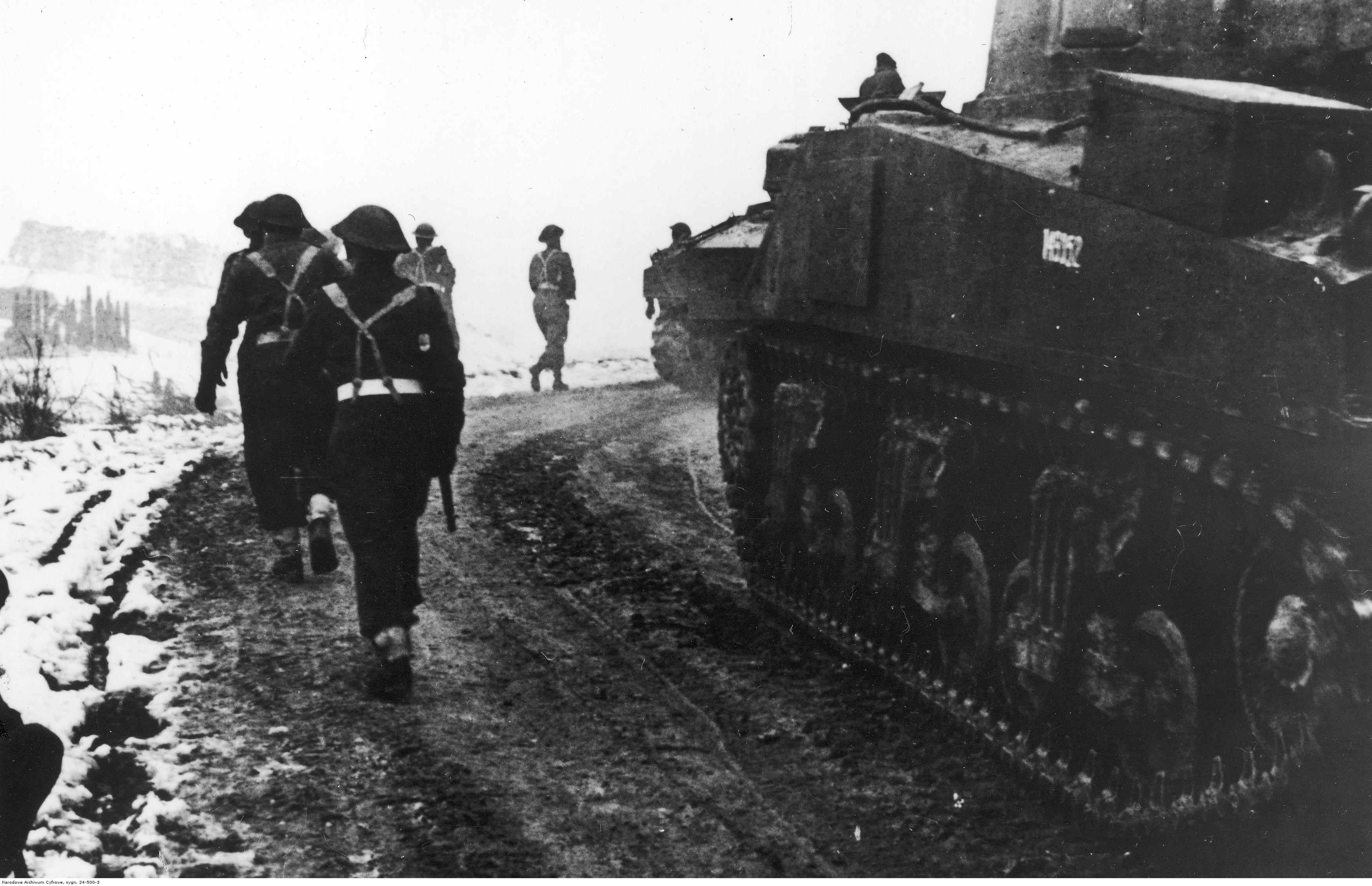 Działania bojowe 2 Korpusu Polskiego podczas walk w Apeninie Emiliańskim. Spieszeni ułani podolscy z czołgami M4 Sherman 4 Pułku Pancernego "Skorpion" pod Predappio. Archiwum Fotograficzne Tadeusza Szumańskiego. Sygnatura: 24-500-3